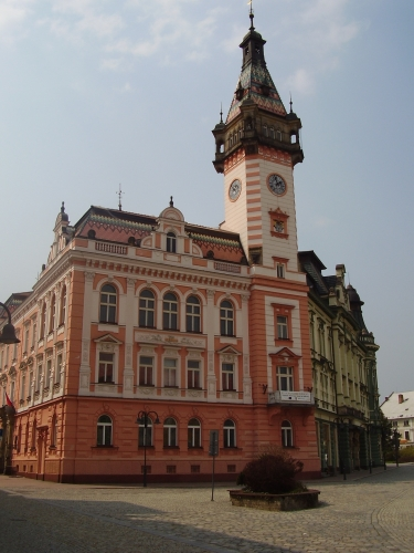 Radnice v Krnově opravená po záplavách v roce 1997.